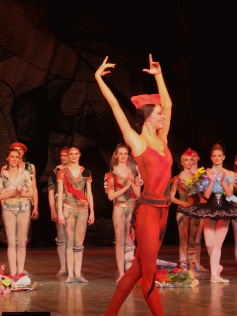 Творческий вечер М.Вежновец и М.Ковалёва. "Болеро"